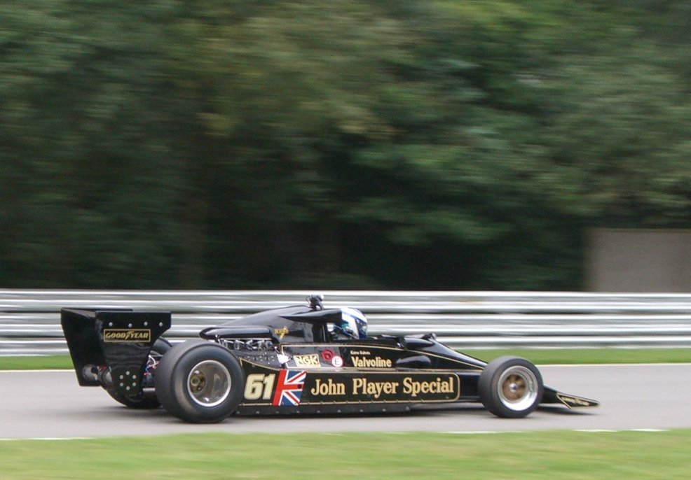 Katsuake Kubota Lotus 78 (2005)